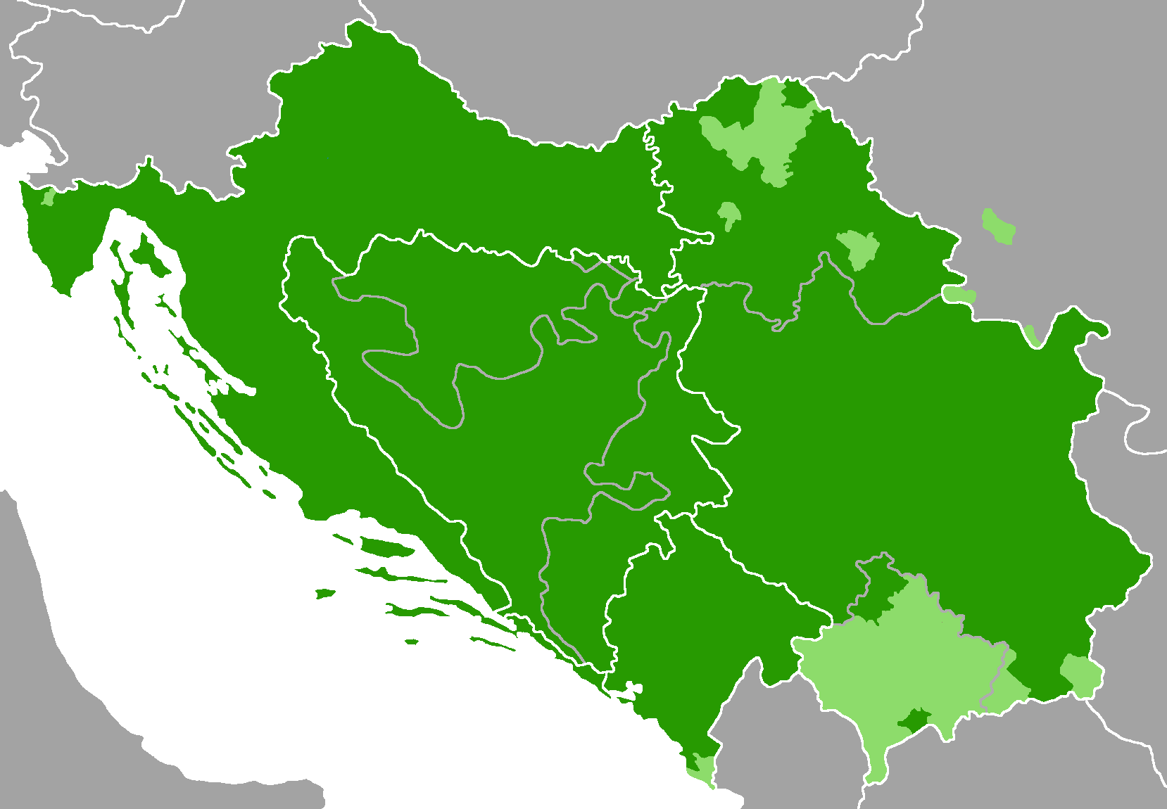 Idioma serbocroata Donde es mayoritario Donde es minoritario